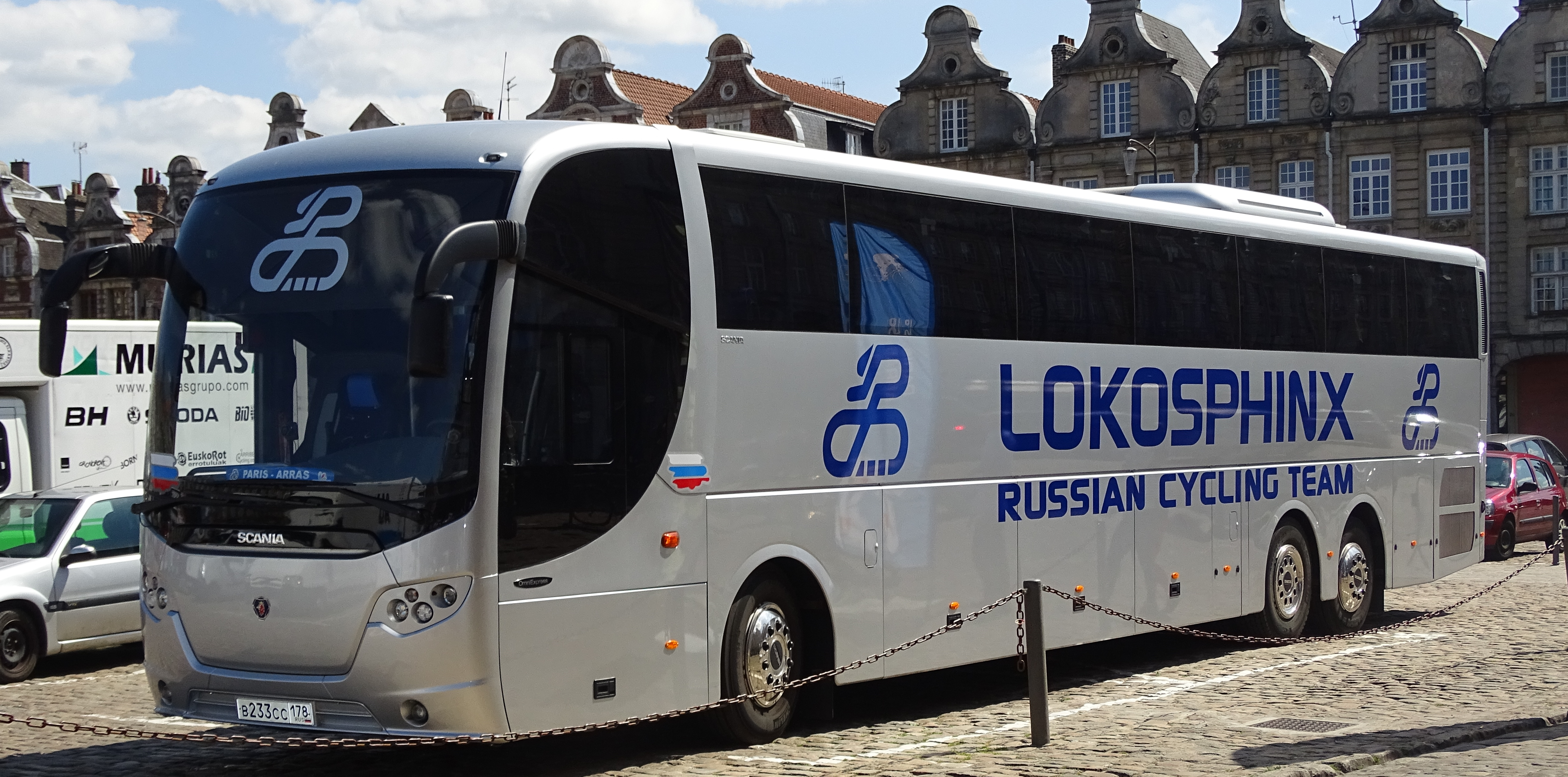 Reportage réalisé le dimanche 24 mai 2015 à l'occasion du départ et de l'arrivée de la troisième étape du Paris-Arras Tour 2015 à Arras, Pas-de-Calais, Nord-Pas-de-Calais, France. Depicted team: Lokosphinx